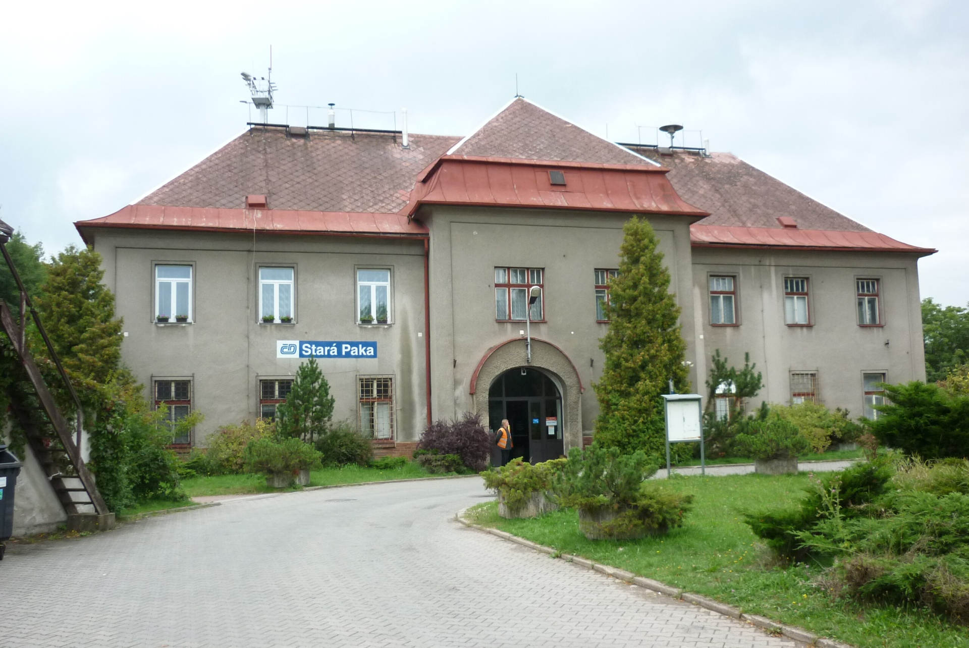 Stará Paka - nádraží ČD